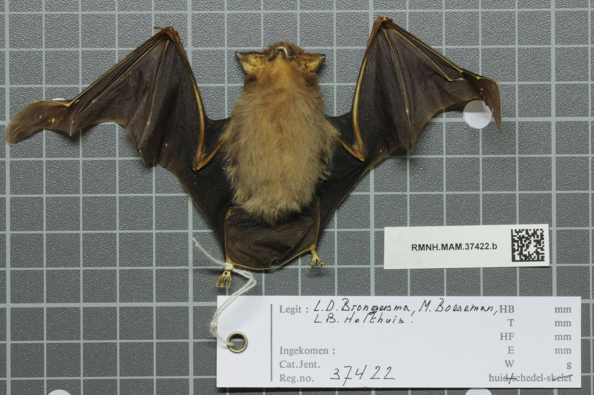 Emballonura raffrayana raffrayana